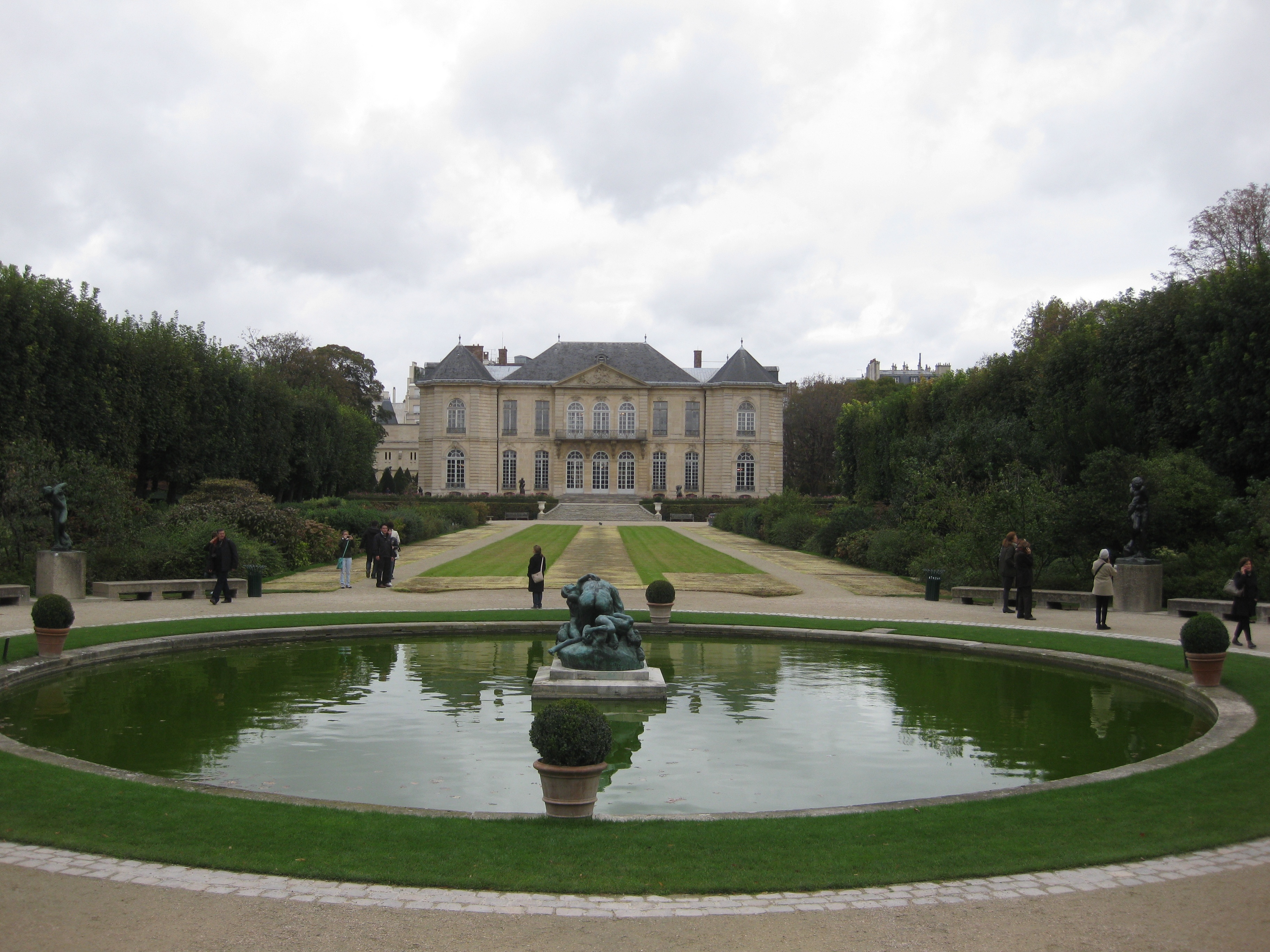 L'hôtel Biron à Paris